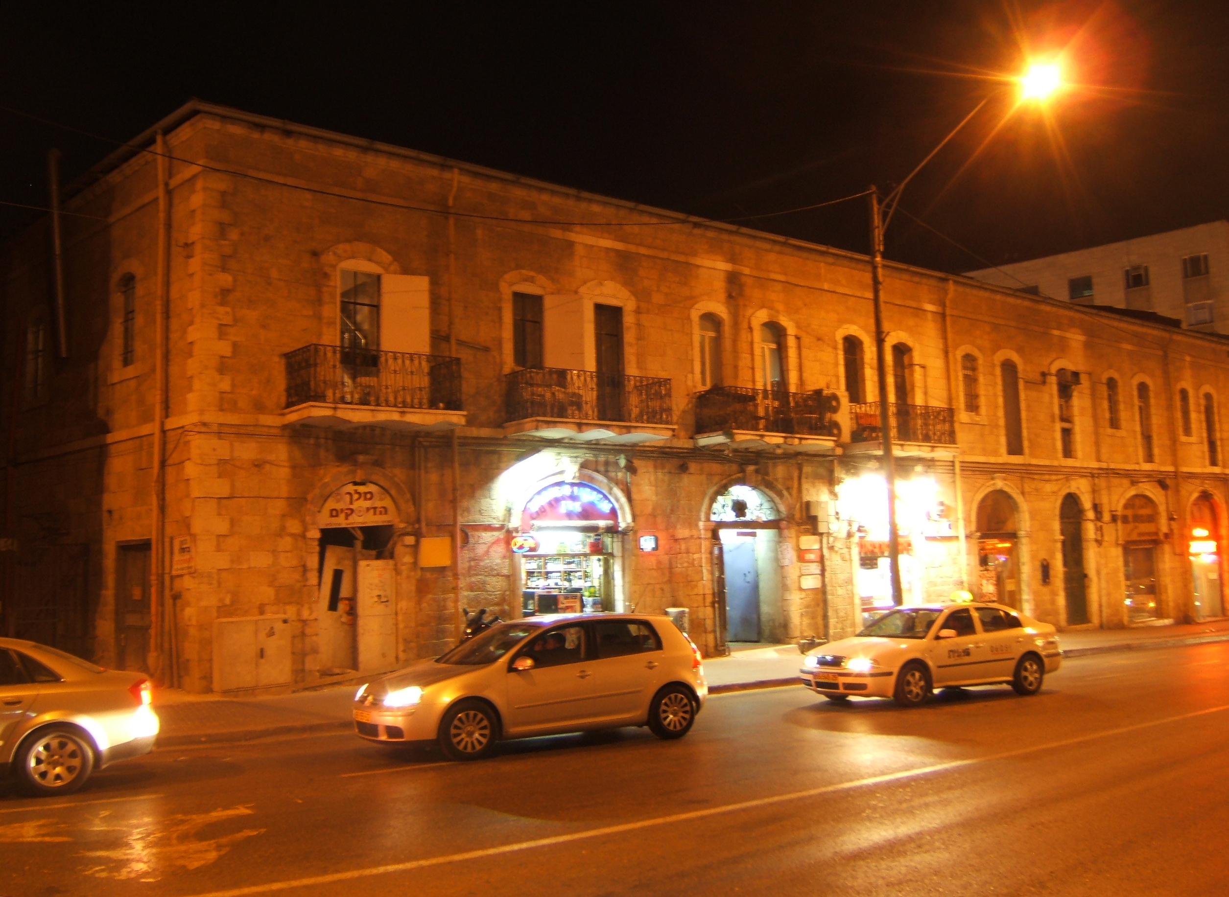 31 Jaffa Road, Jerusalem